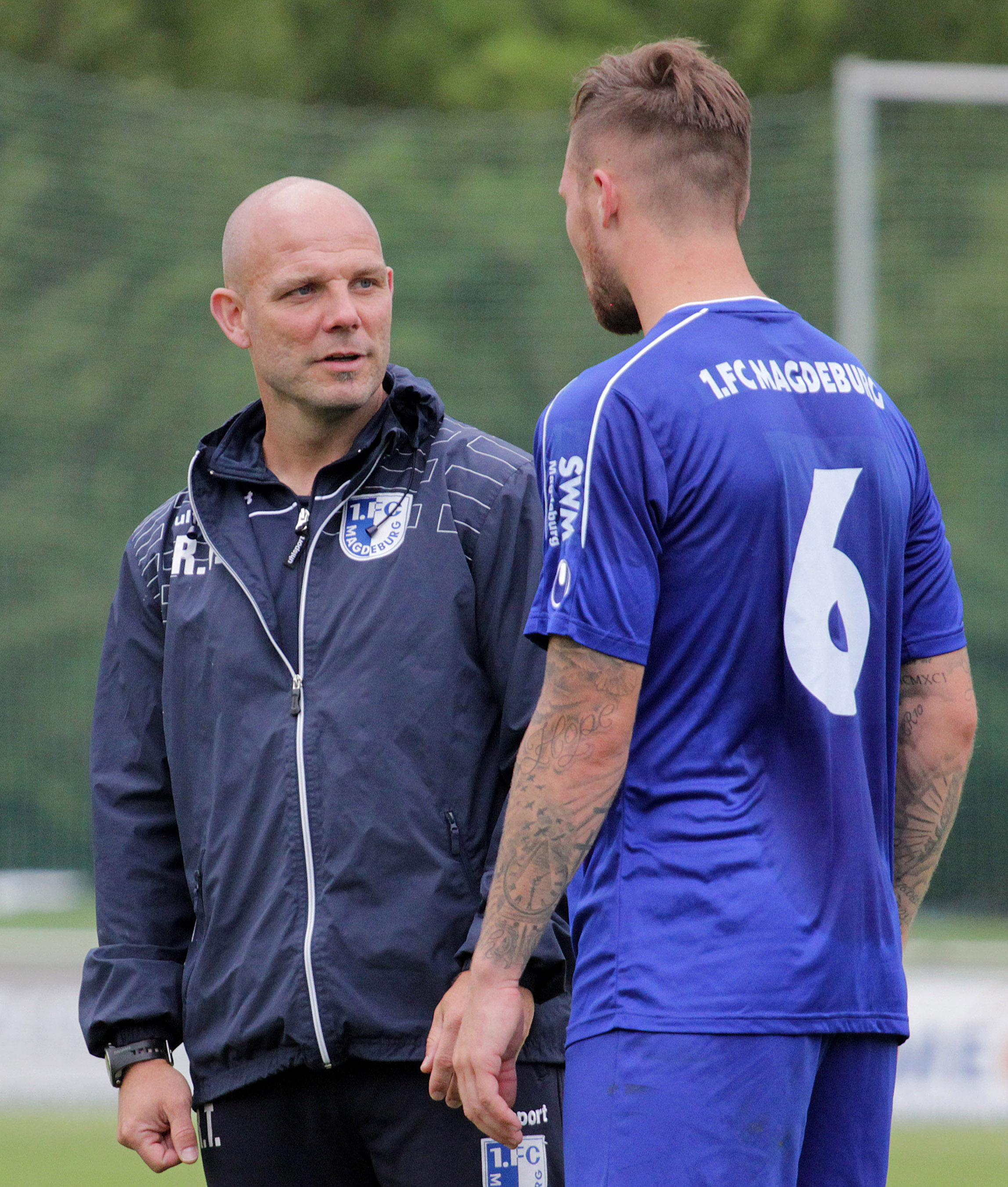 Ronny Thielemann